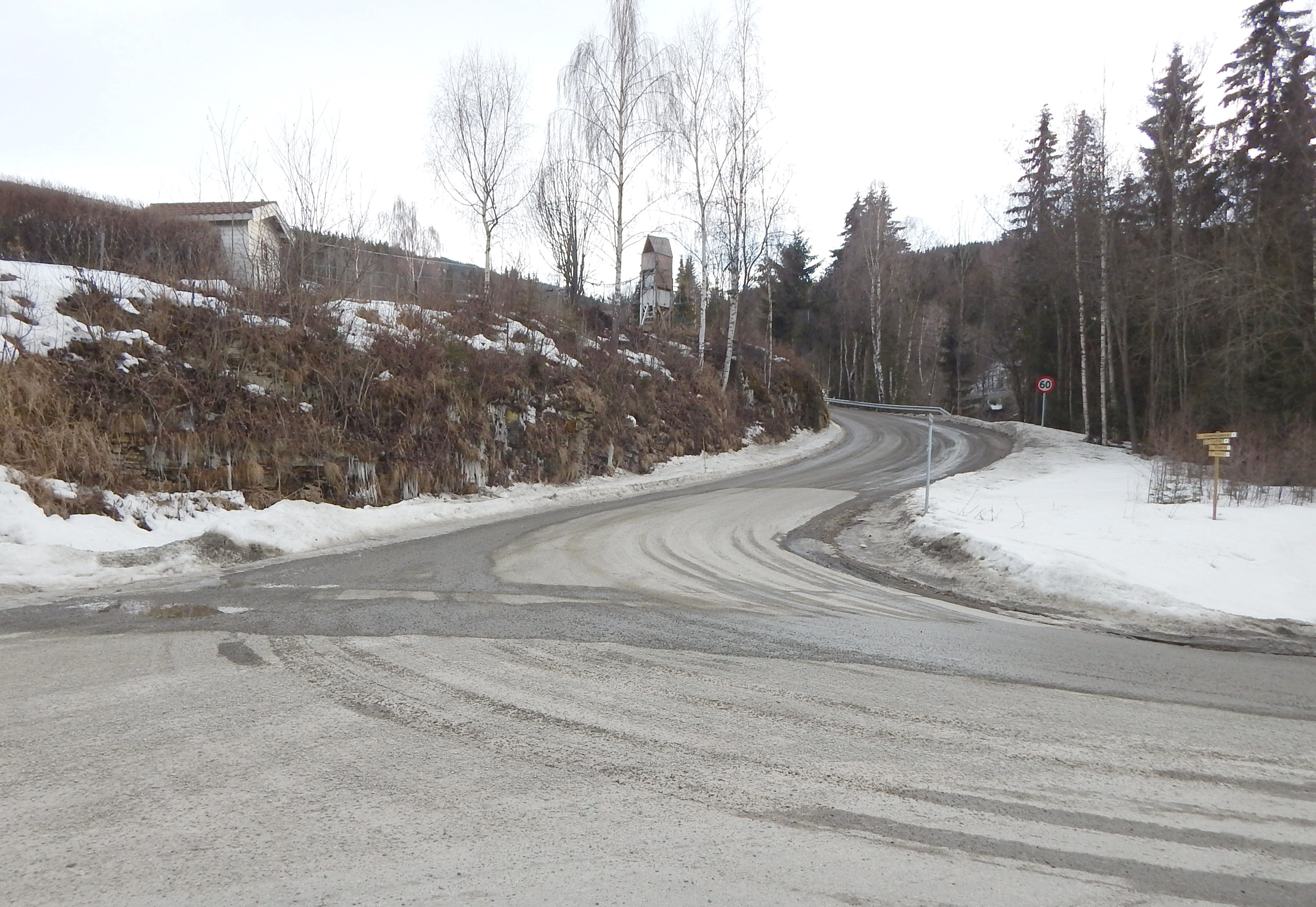 Nordre Liavegen (fylkesvei 399) sett fra Baksidevegen (fylkesvei 319)